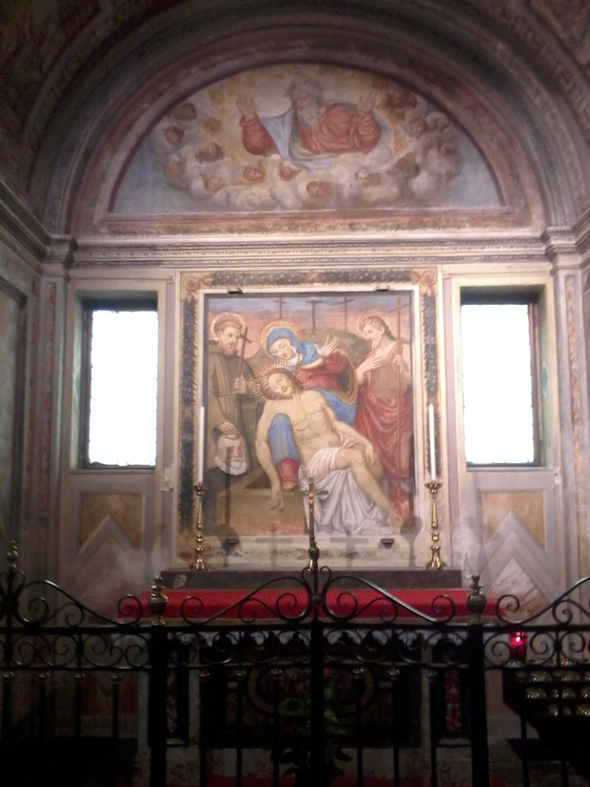 Cappella della Pietà nella chiesa di San Nicolao nel Santuario di Corbetta (MI) - Italy